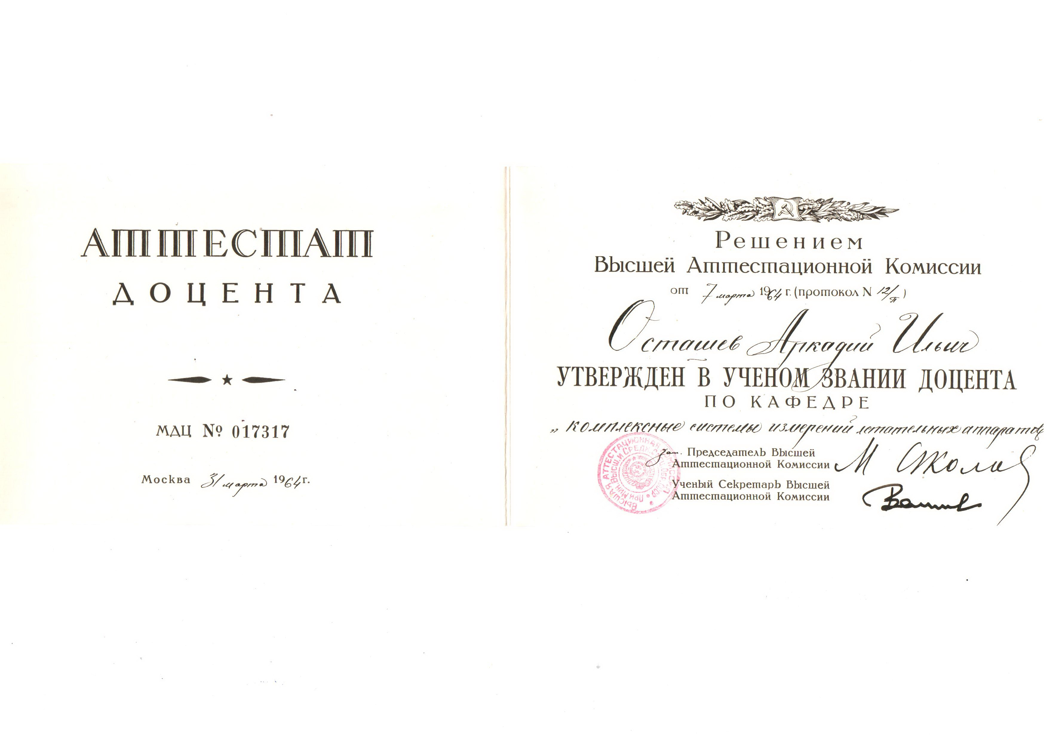 Аттестат доцента Осташева А.И.